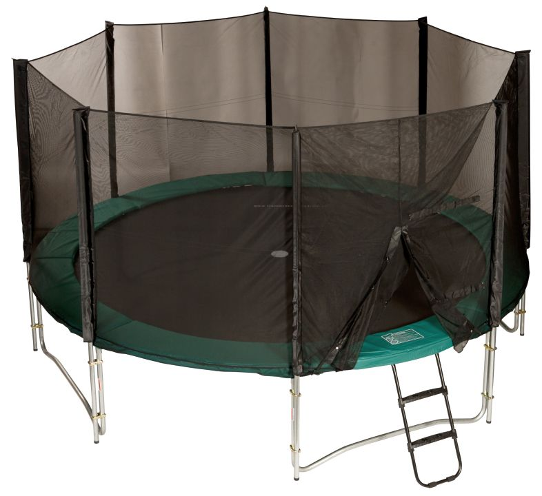 Fly 14 med skyddsnät delux.